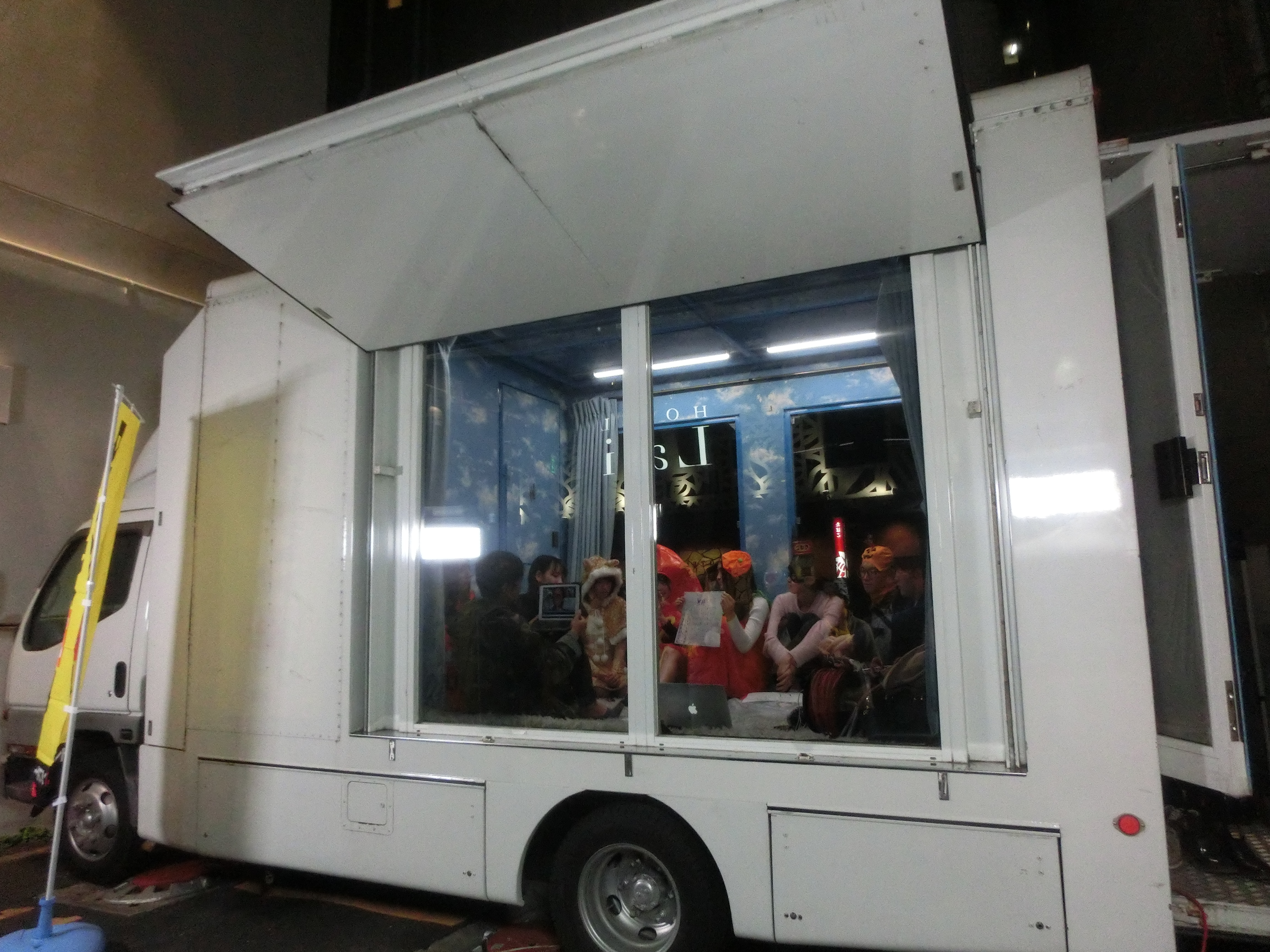 SOD creat Shibuya Halloween